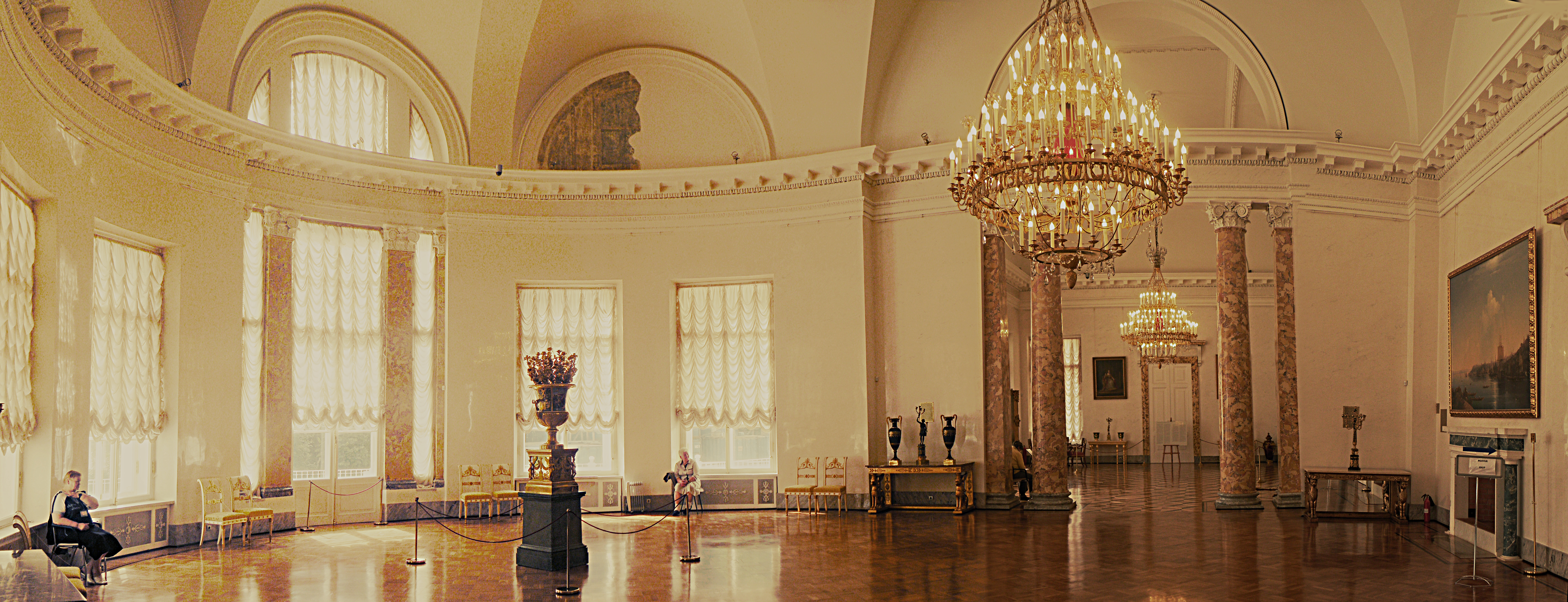 Дворец Александровский (со статуями) (Санкт-Петербург и Лен.область, Пушкин, Дворцовая улица, 2, центральные залы)